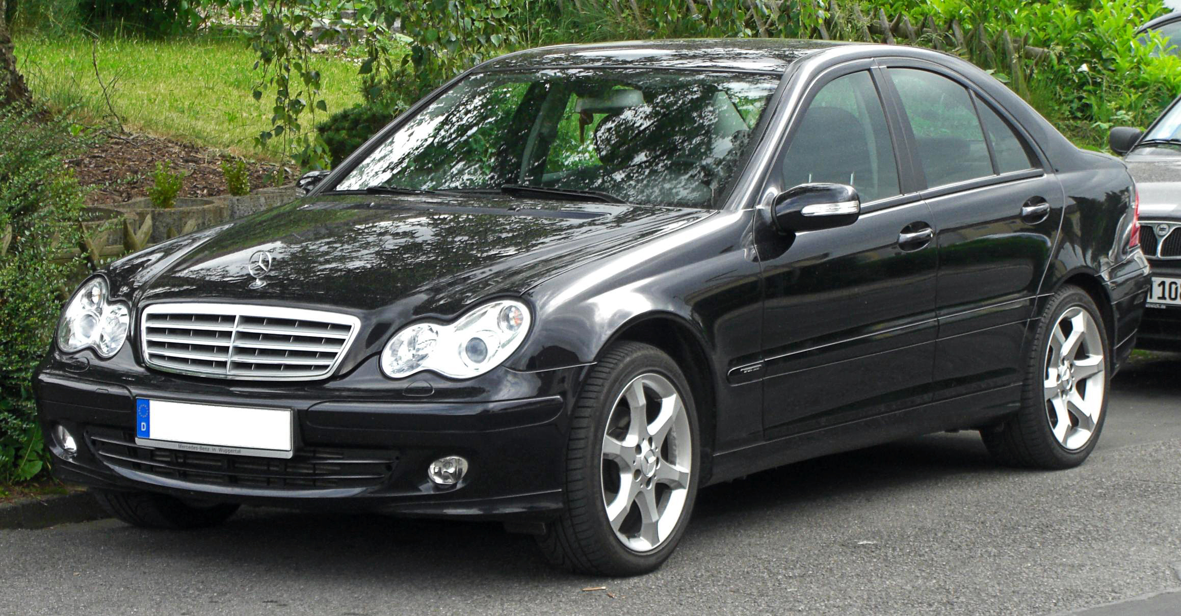 Mercedes C-Klasse (W203)